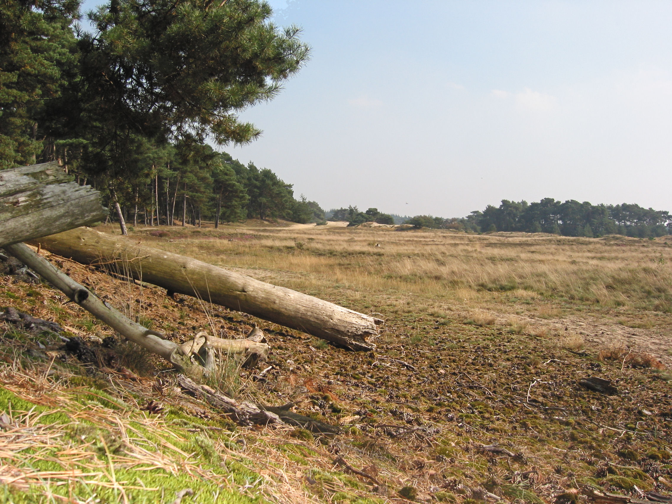 Wekeromse Zand vergrassing)